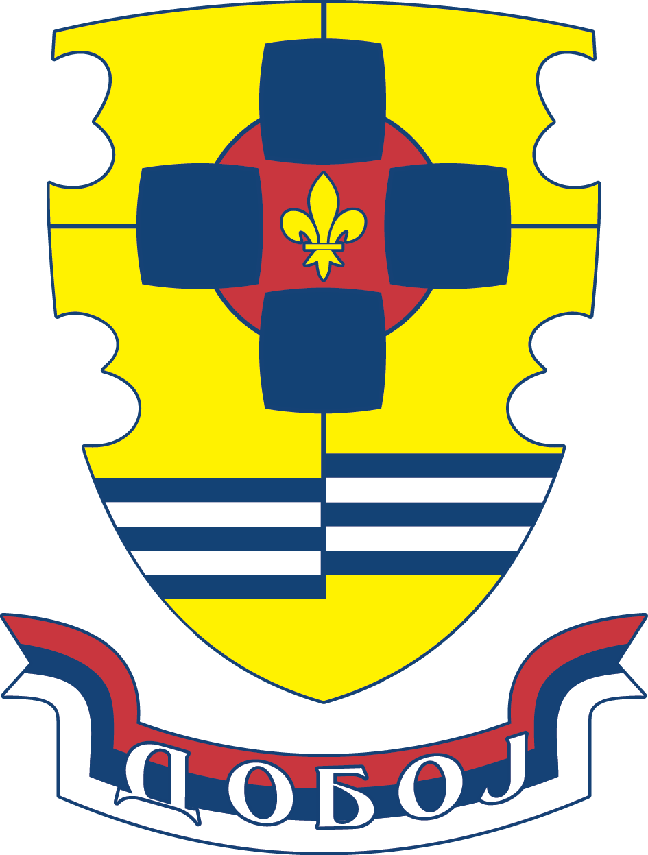 Grb grada Doboja predstavlja zvanični simbol grada u skladu sa važečim zakonskim propisima, i usvojen je od strane skupštine lokalne samouprave.